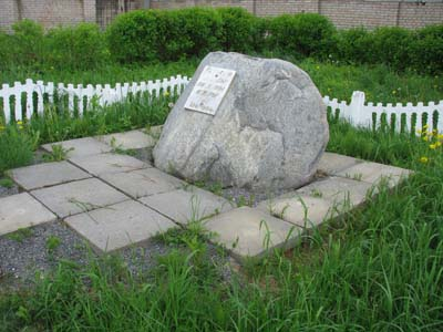 Один из памятников на месте расстрела евреев Орши во время Холокоста.